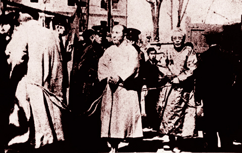 반민특위에 체포, 이송되는 김연수, 최린